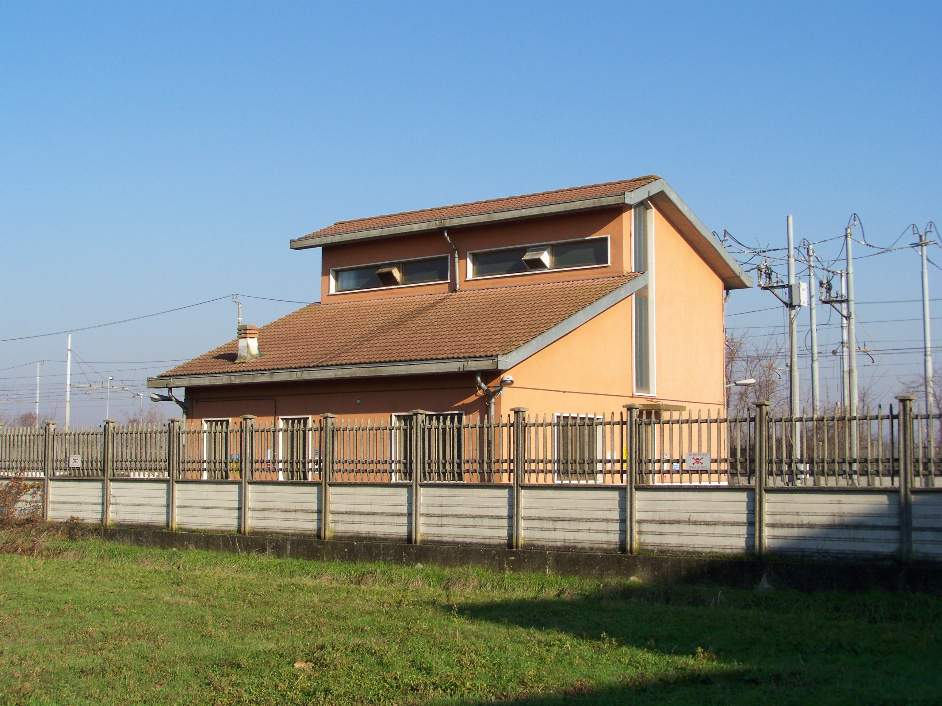 Edificio della cabina per la trazione elettrica presso la stazione di Olmeneta.